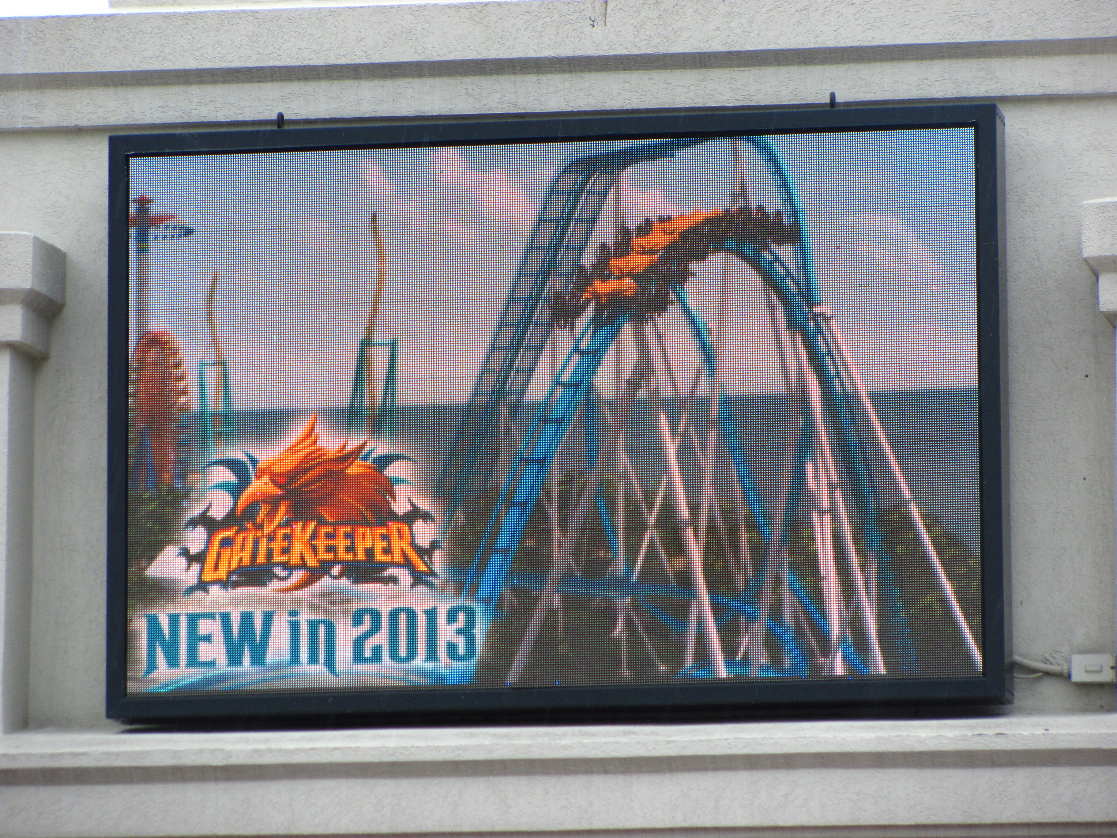 Cedar Point 030